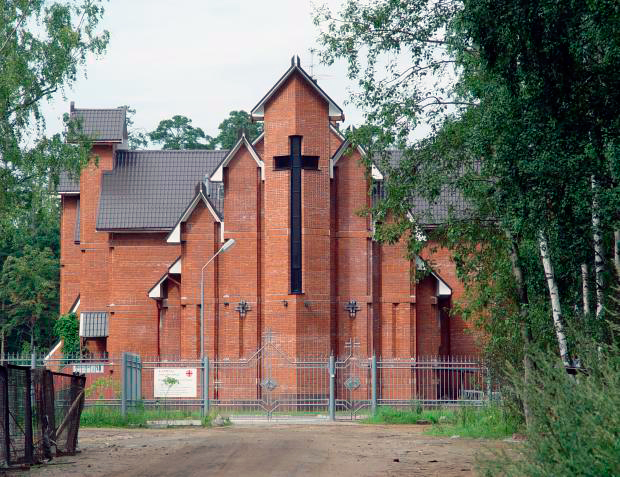 Часовня святой Елизаветы Тюрингской (Санкт-Петербург) при доме монсеньера Хартмута Каниа